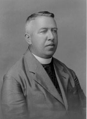 Pfarrer Matthias Spanlang, 1940 im KZ Buchenwald ermordet